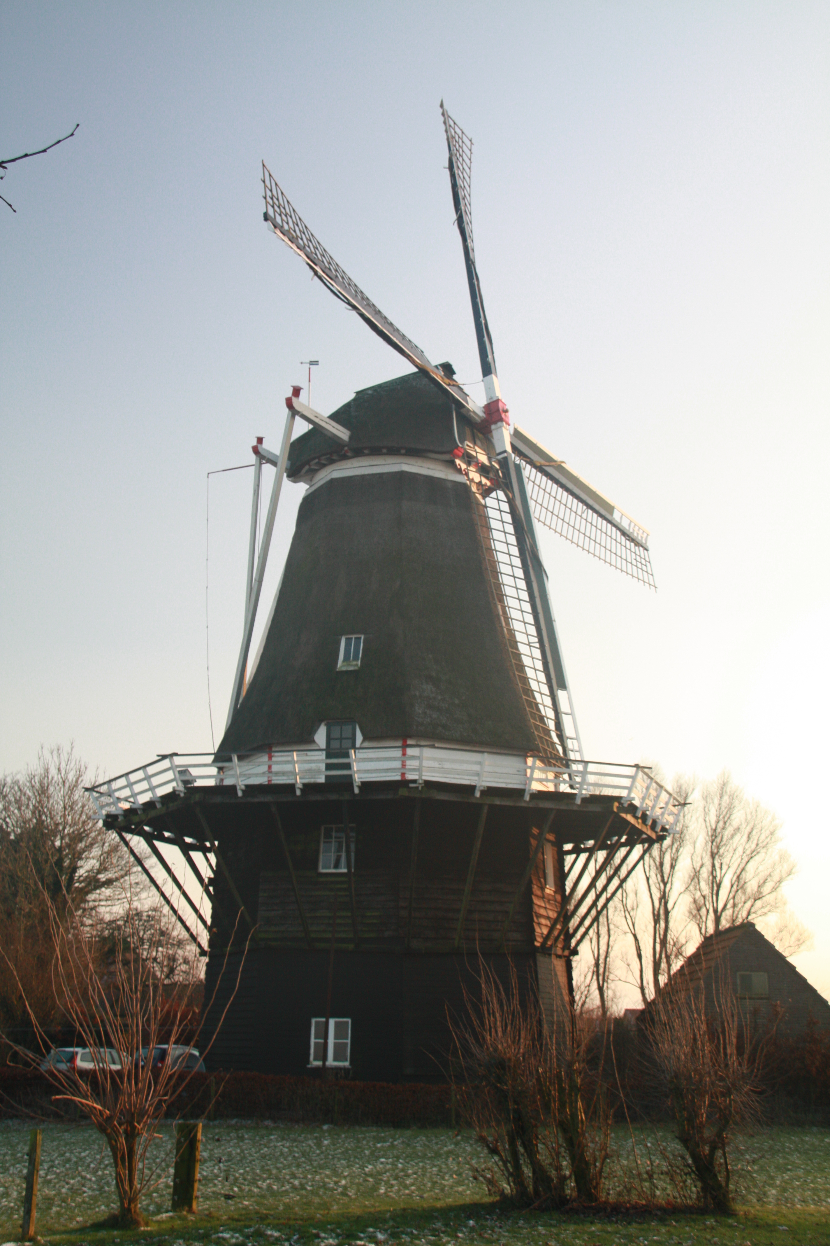 De Vlijt (Marle)